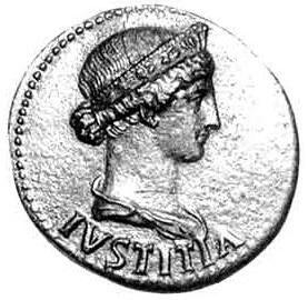 As uitgegeven door Tiberius Claudius Nero (zoon) (22-23) met een afbeelding van Livia Drusilla II [1] en het woord IVSTITIA aan de ene kant en een afbeelding van hemzelf aan de andere. Afbeelding oorspronkelijk afkomstig van Classical Numismatic Group, Inc. (toegestaan voor niet-commercieel gebruik) (kopie van deze site overgenomen, daar ze niet meer aanwezig was op CNG)